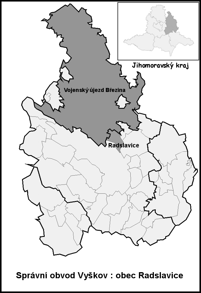 Hranice Radslavice (Vyškov- czech republic)